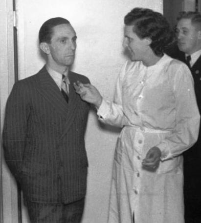 Joseph Goebbels und Leni Riefenstahl Reichsminister Dr. Goebbels besichtigt die umfangreichen Vorarbeiten für den Olympia-Film, der bekanntlich von Leni Riefenstahl hergestellt wird. Die Uraufführung des großen Filmwerkes, das aus zwei Teilen besteht, soll Ende Januar in Berlin stattfinden. Abgebildete Personen: Goebbels, Joseph: Reichsminister für Volksaufklärung und Propaganda, Gauleiter Berlin, Deutschland Riefenstahl, Leni: Filmproduzentin, Regisseurin, Schauspielerin, Fliegerin, Bundesrepublik Deutschland (PND 118600761)